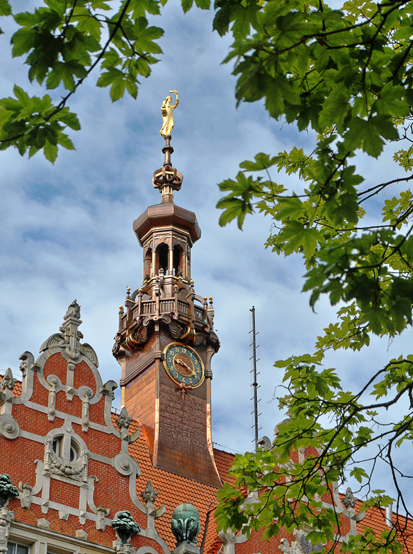 La Torre del Edificio Principal